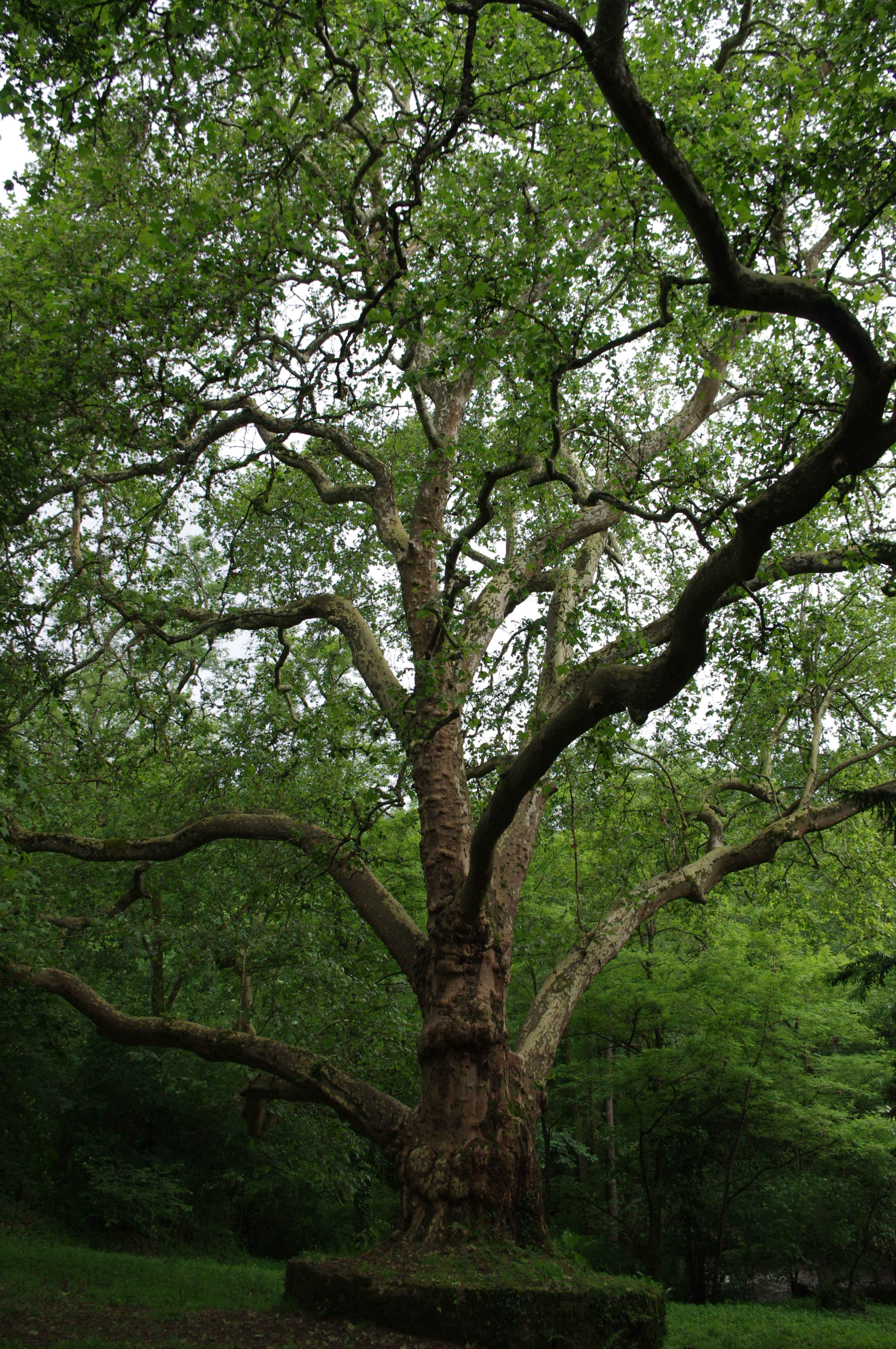 Site de Peyrassoulat, Chéronnac, Haute-Vienne, France. Platane près de la Tardoire. L'âge des deux platanes sur le site est estimé à 200 à 300 ans.